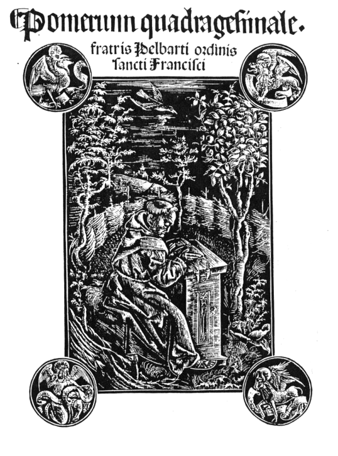 Temesvári Pelbárt (1435 körül – 1504) Pomerium c. művének (1499) címlapja